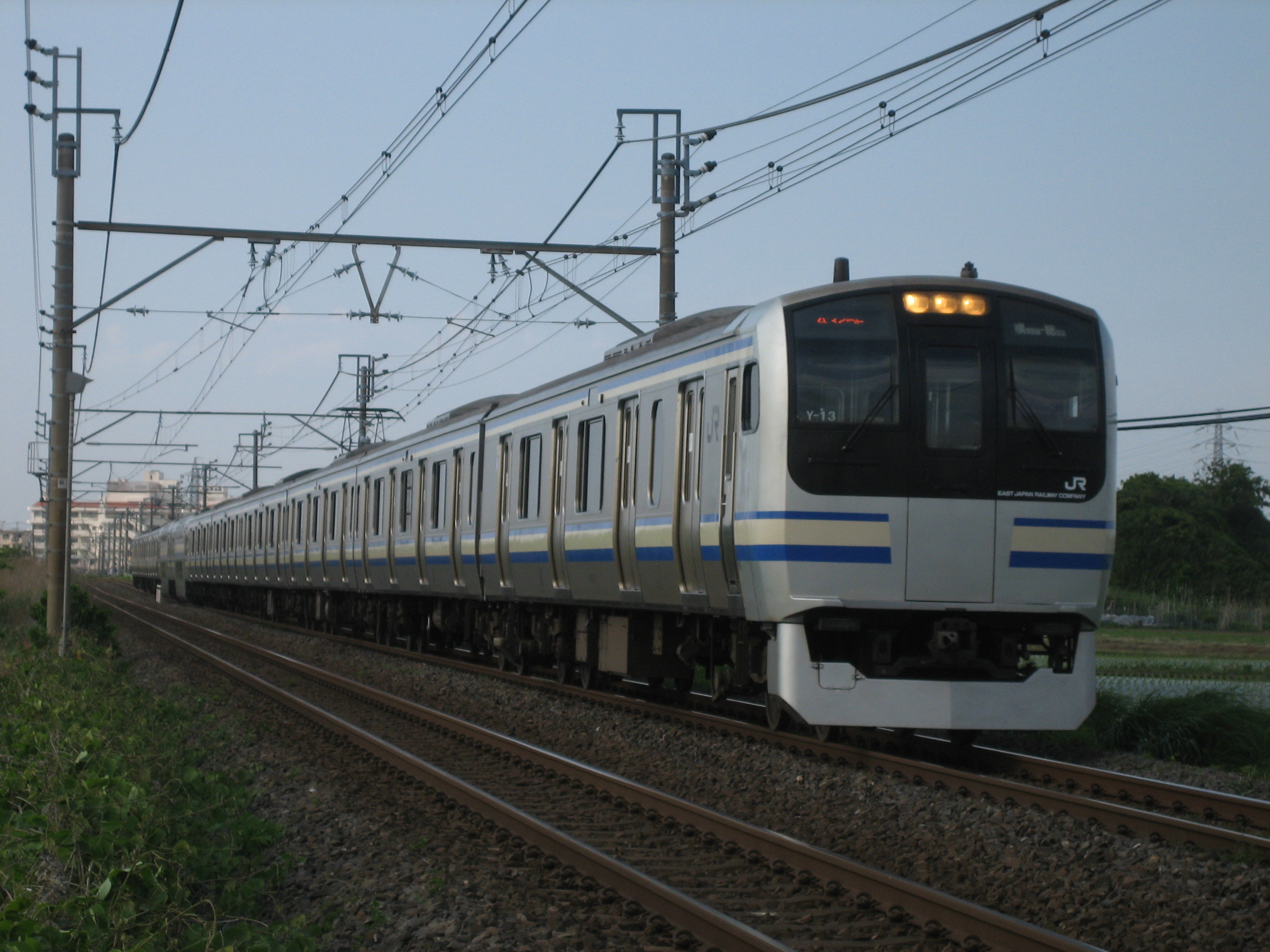 内房線を走行する総武快速E217系